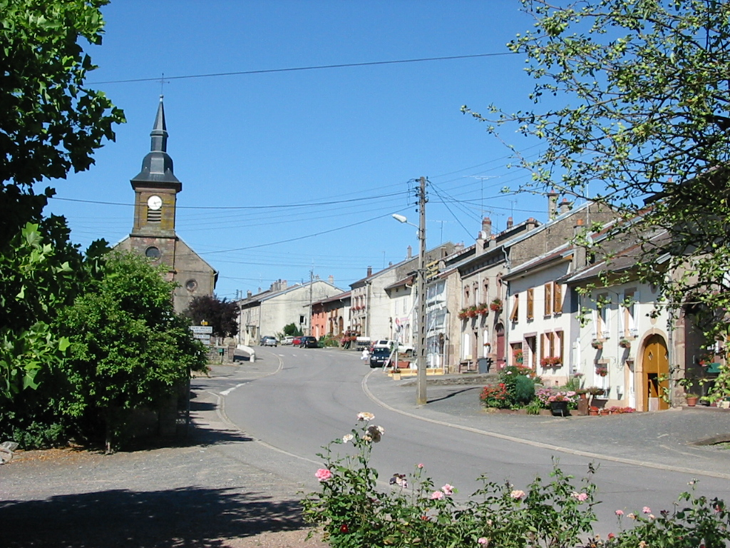 Pexonne Commune du canton de Badonviller Photo personnelle du 17 juillet 2006. Copyright © Christian Amet